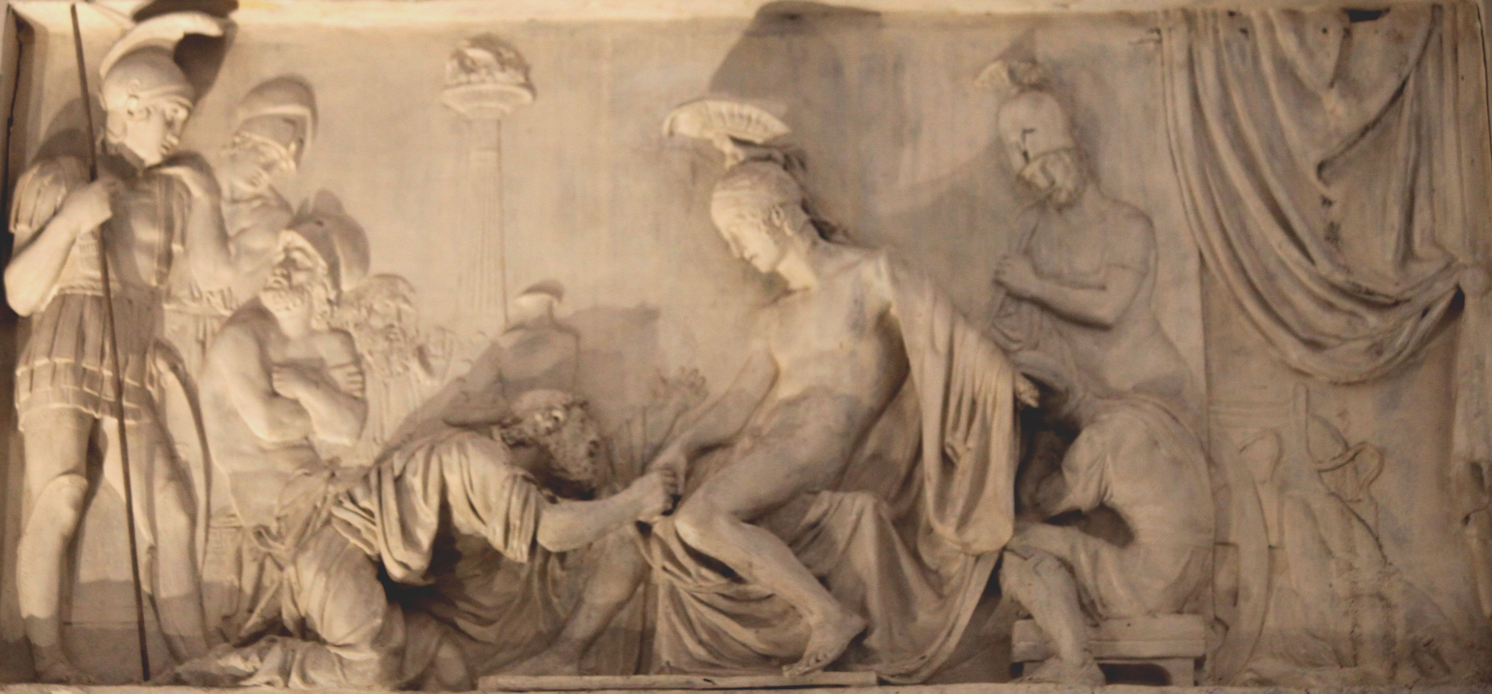 Gallerie dell'Accademia - MIBAC This is a photo of a monument which is part of cultural heritage of Italy.